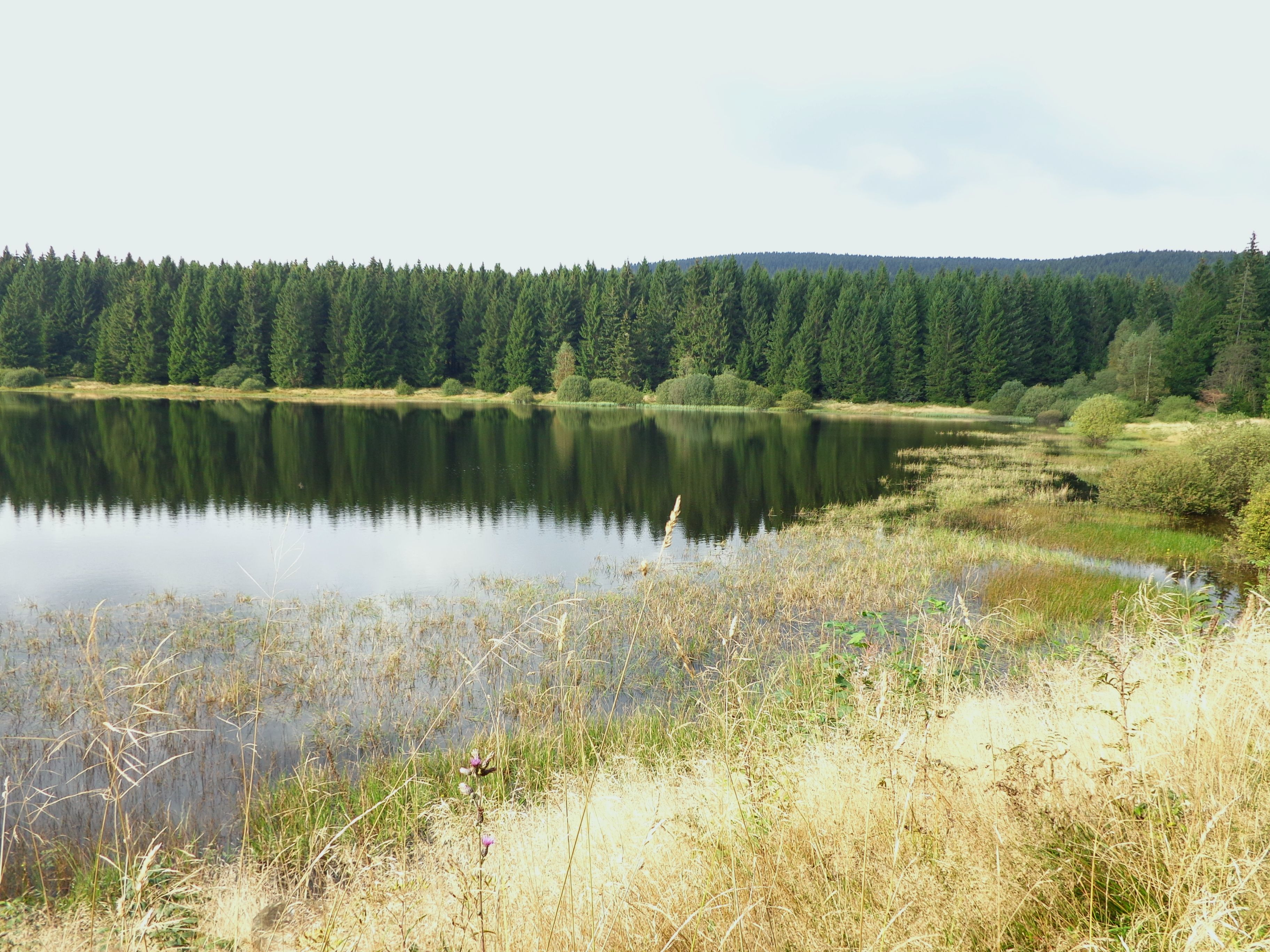 Zankwieser Teich des Oberharzer Wasserregals in der Nähe von Festenburg im Oberharz